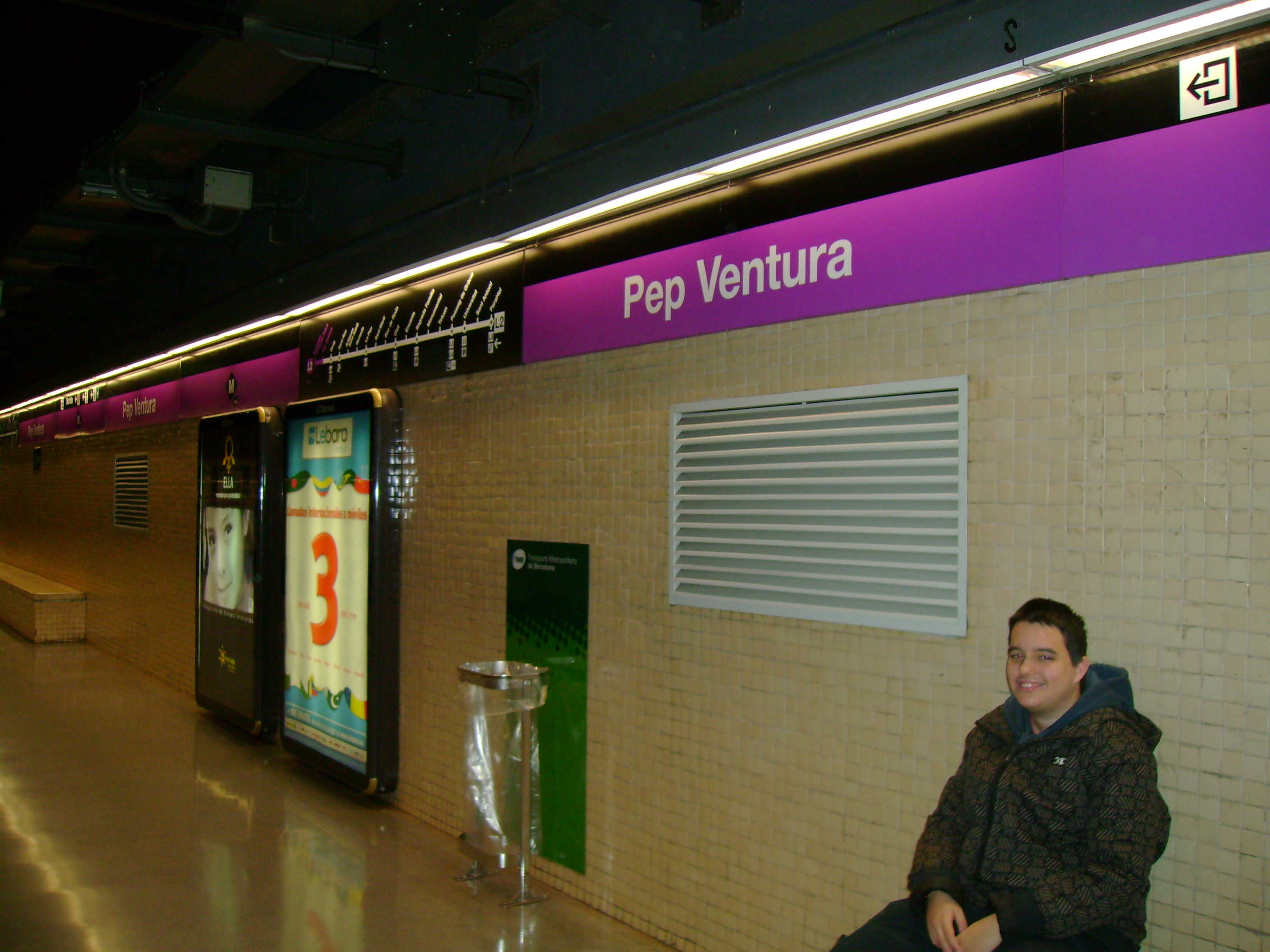 Foto capturada per la càmara de l'Ismael Miralles (el meu amic) a l'estació de Pep Ventura (Metro de Barcelona).